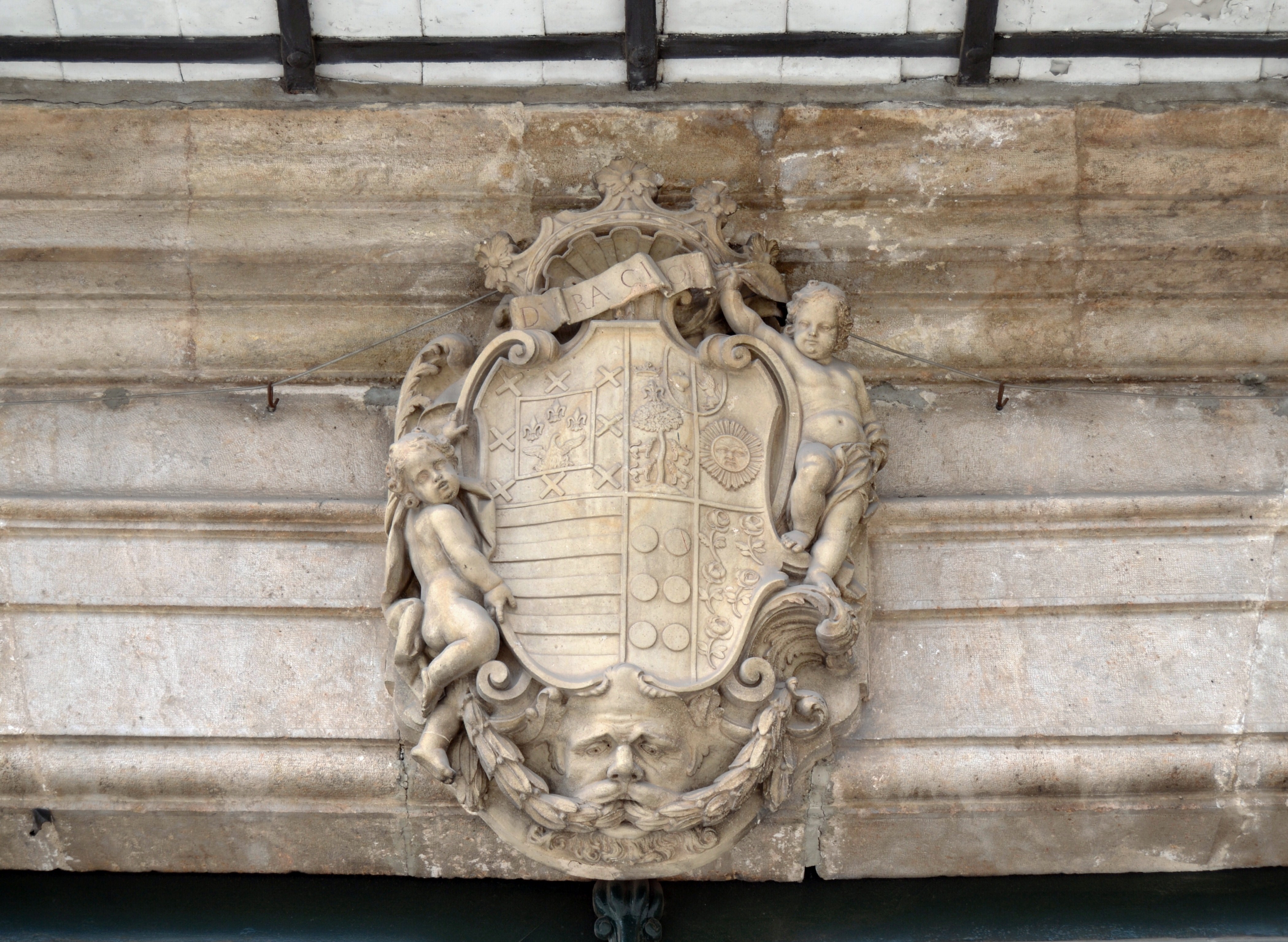 Escut de palau dels marquesos de Montortal. Obra de Josep Esteve i Bonet.